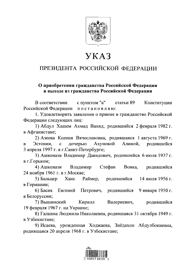 Указ Президента Российской Федерации от 30.09.2015 № 488 «О приобретении гражданства Российской Федерации и выходе из гражданства Российской Федерации»